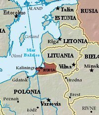 traduzco y cambio título, que el otro no era muy exacto. Modificado a partir de es::en:Image:Kaliningrad map.PNG